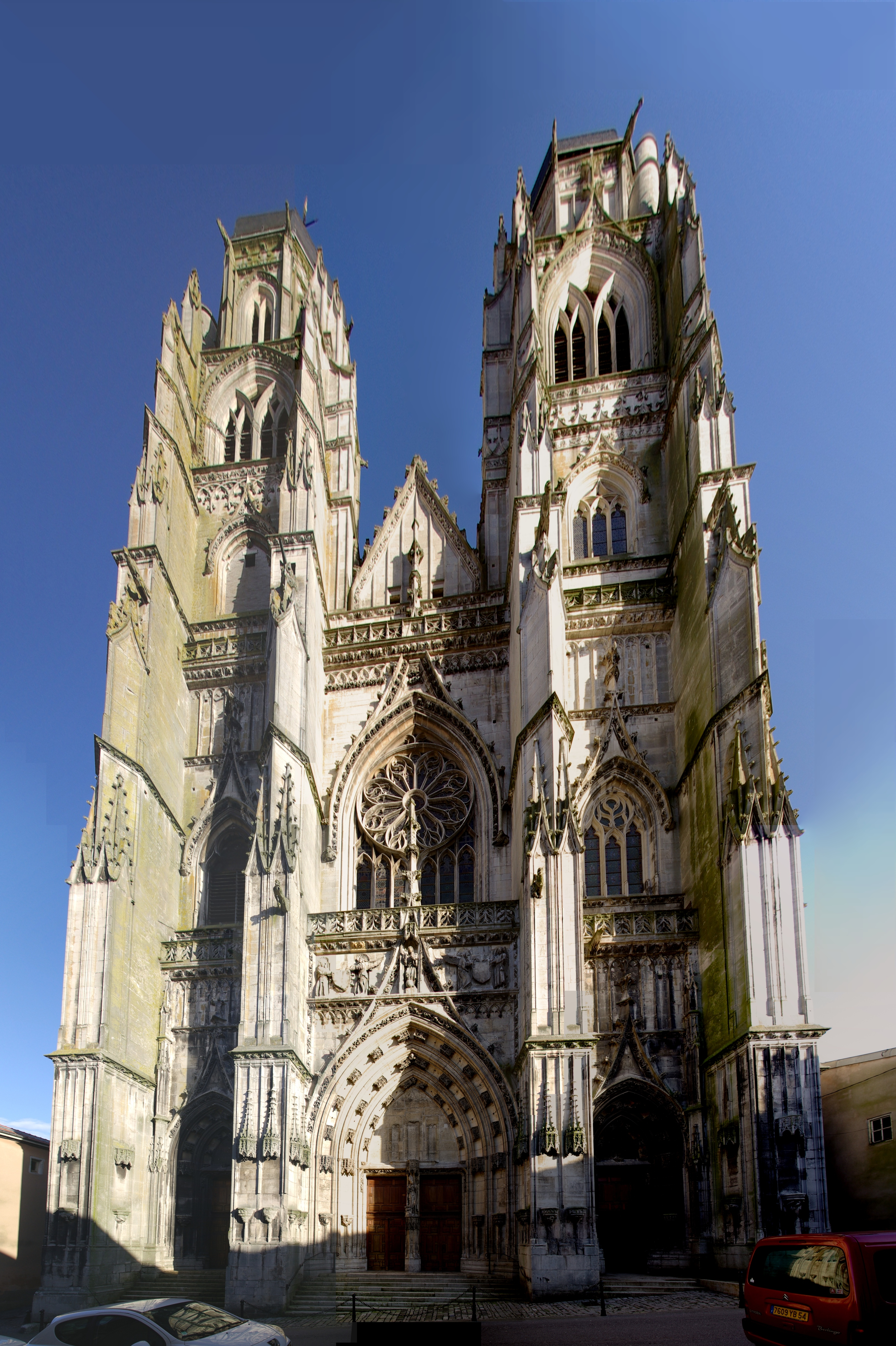 Kathedrale in Saint-Nicolas-de-Port